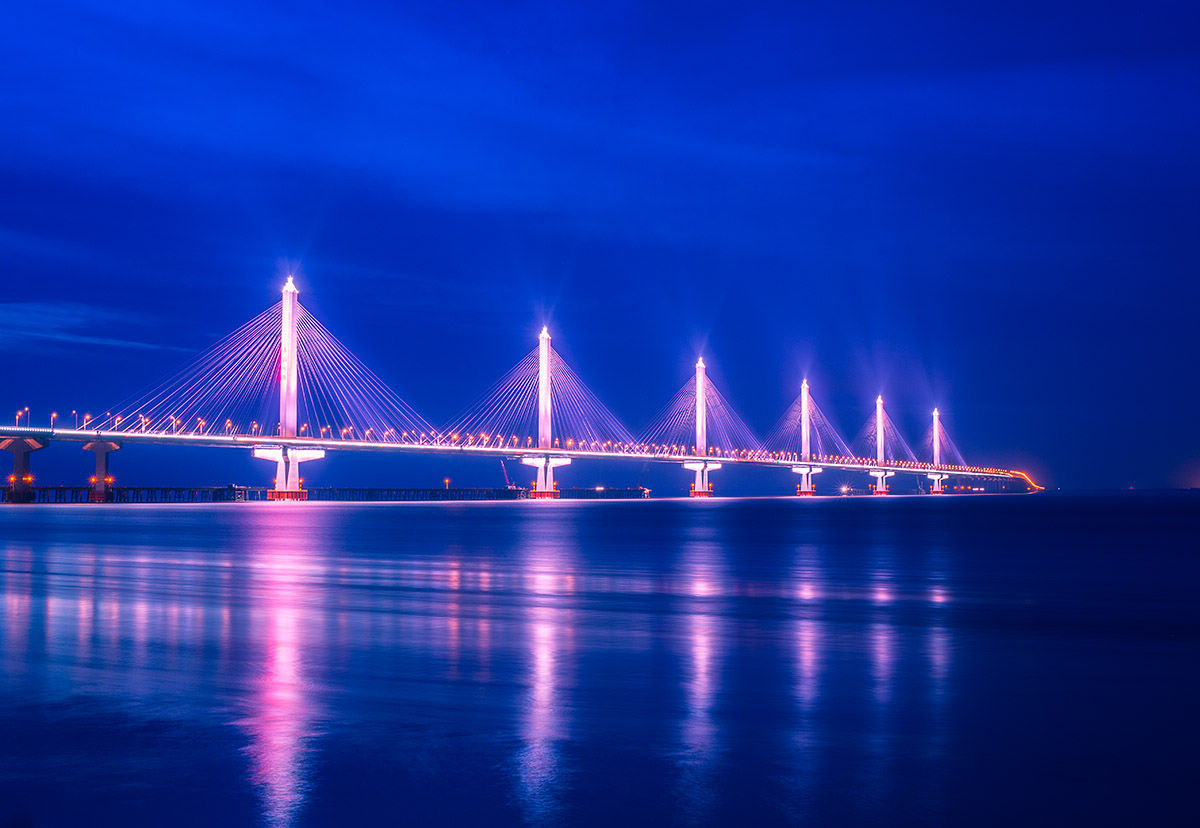 嘉绍大桥 Jiaxing - Shaoxing Bridge